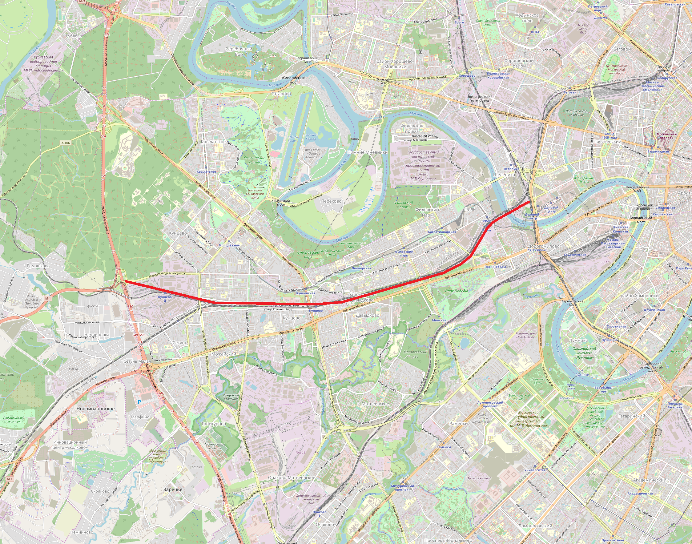 Трассировка северного дублёра Кутузовского проспекта This map may be incomplete, and may contain errors. Don't rely solely on it for navigation.